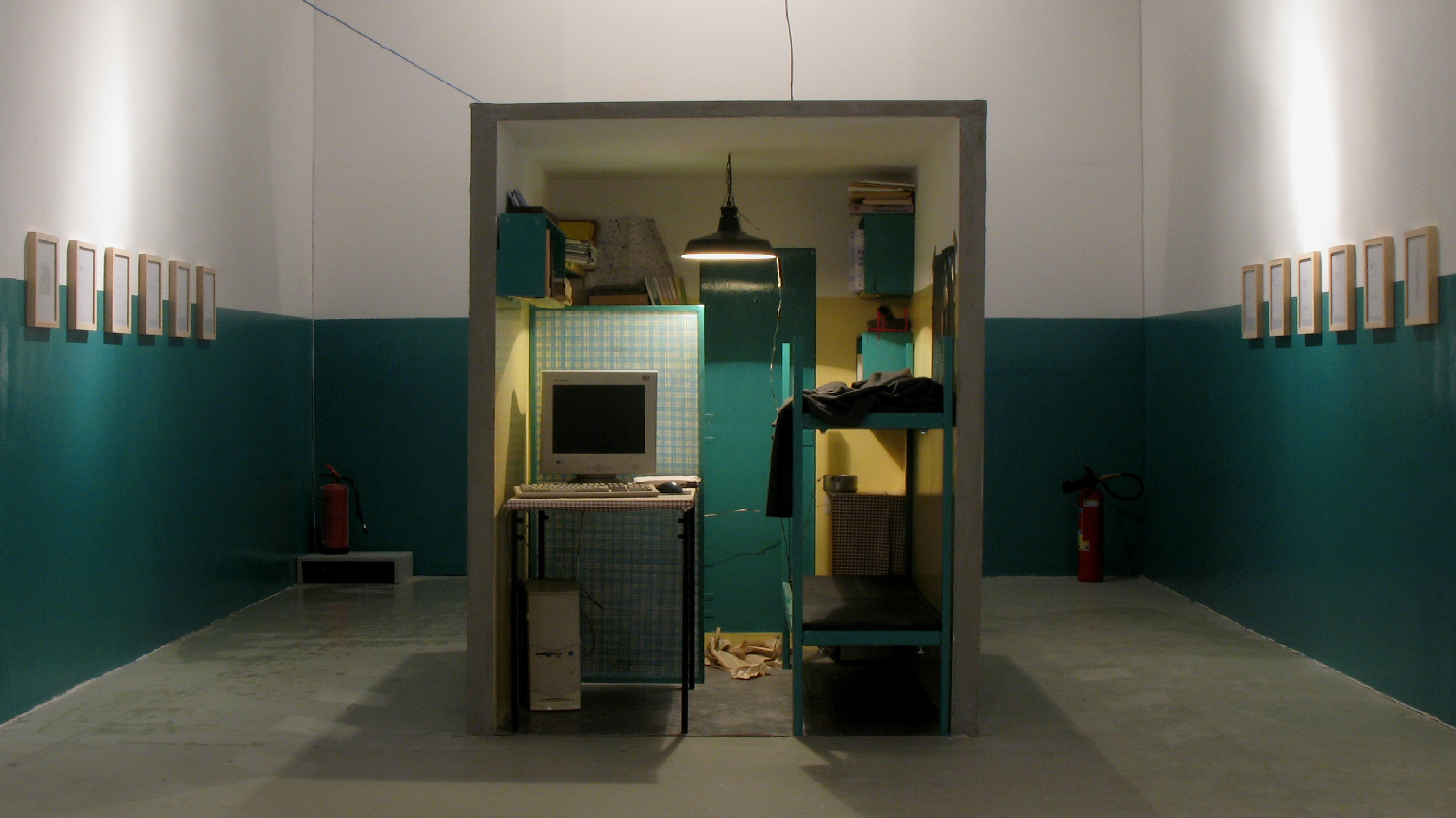 praca Szymona Kobylarza pt. Cela pana Jana Kolano, zdjęcie autora